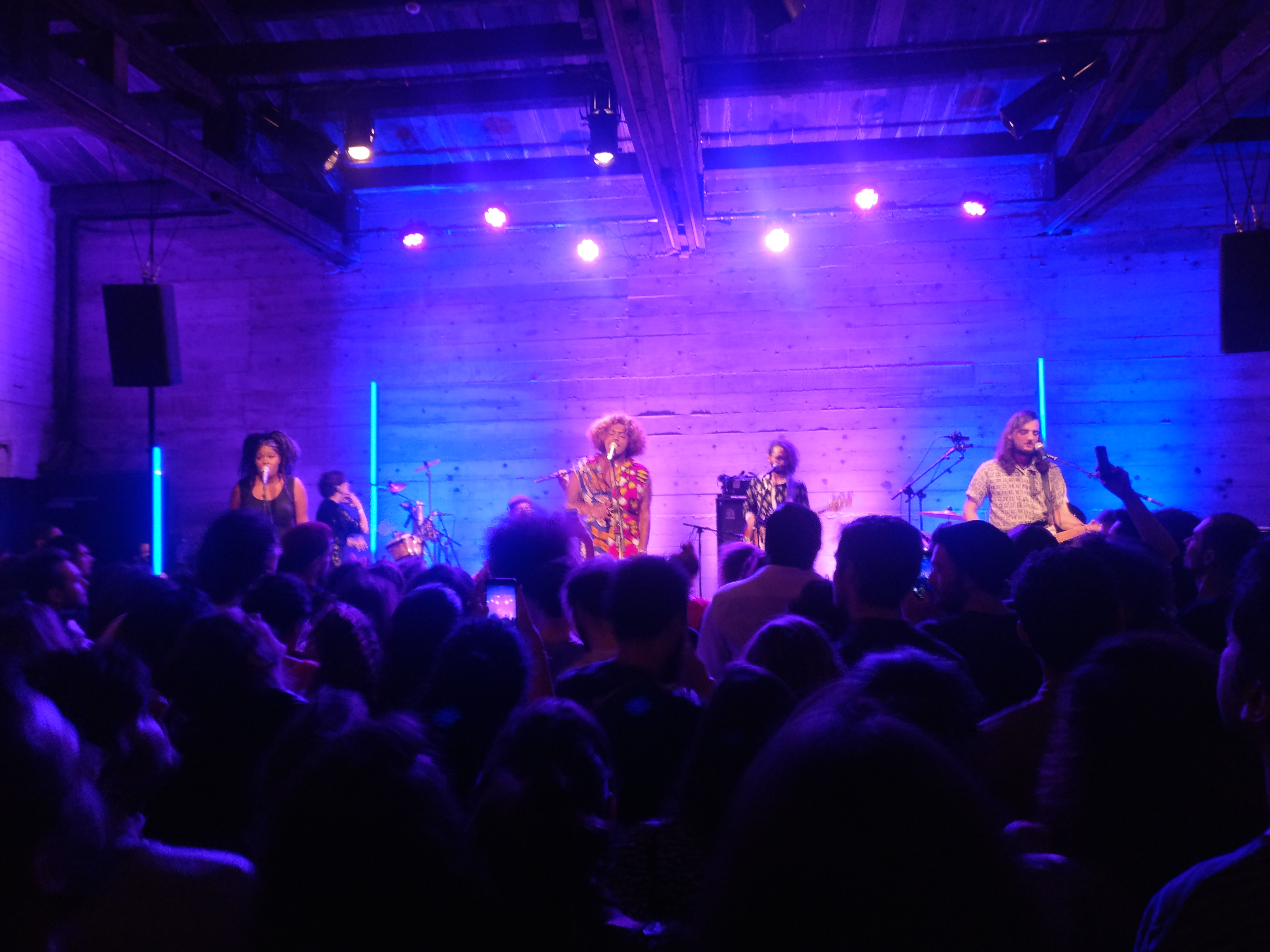 Concert du groupe Liniker e os Caramelows dans le festival Banlieues Bleues 2018, à La Marbrerie, Montreuil.